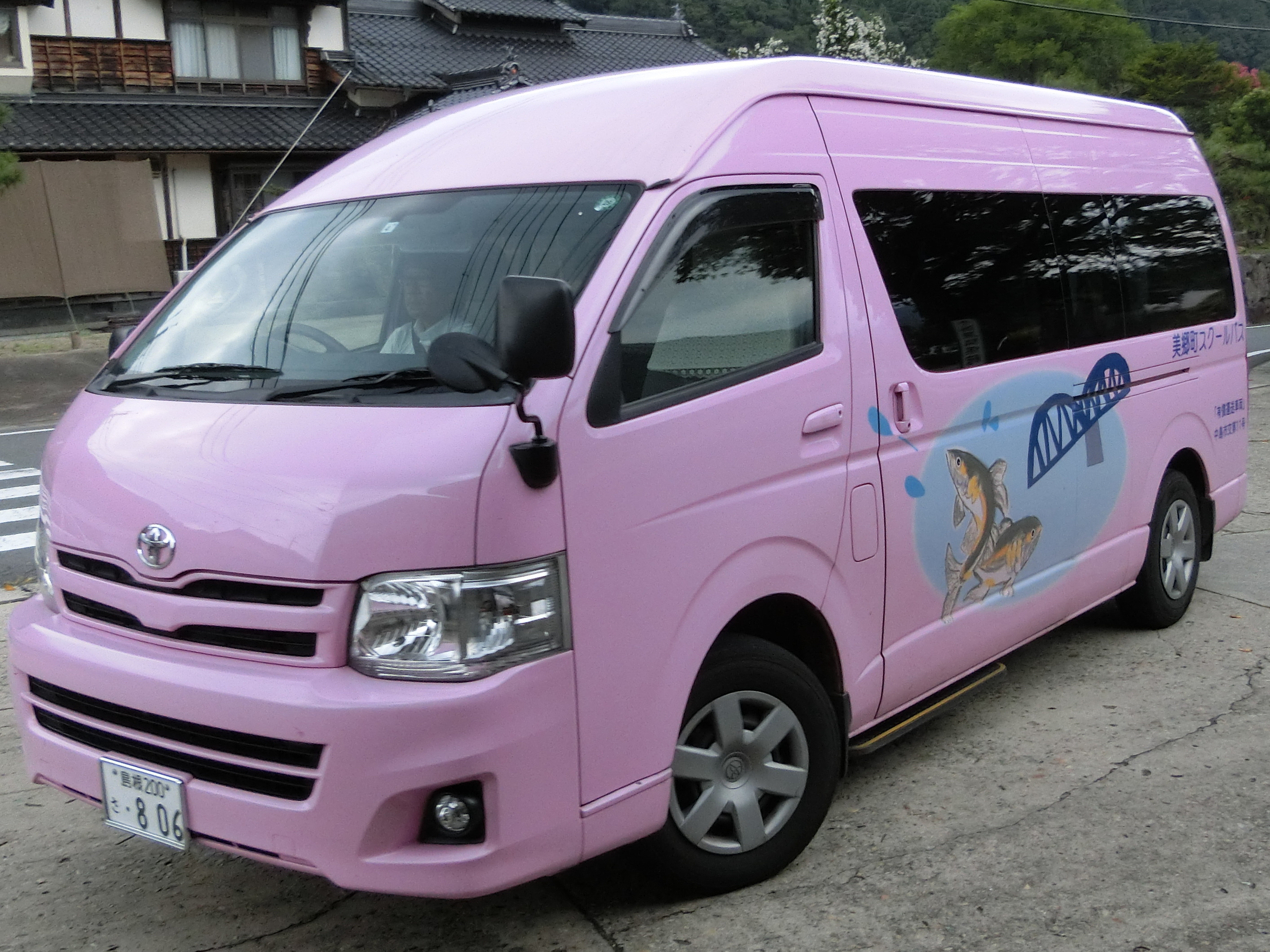 美郷町スクールバスに使用されるワゴン車。浜原駅前で撮影。